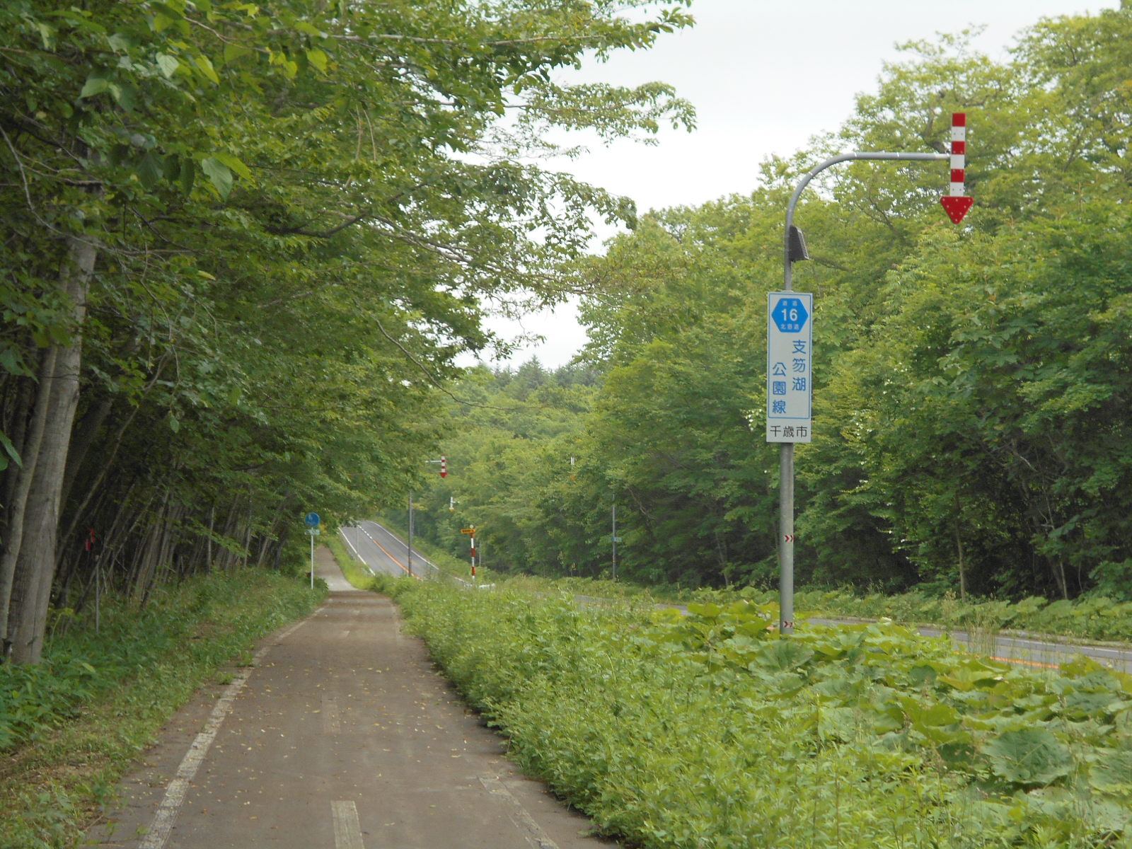 北海道道16号支笏湖公園線（右側)と北海道道872号支笏湖公園自転車道線(左側)